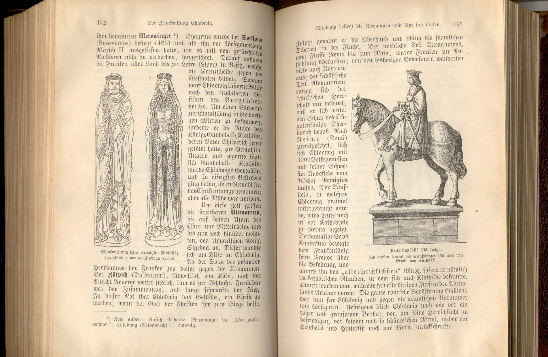 Seiten 452/453 aus K. F. Becker's Weltgeschichte.